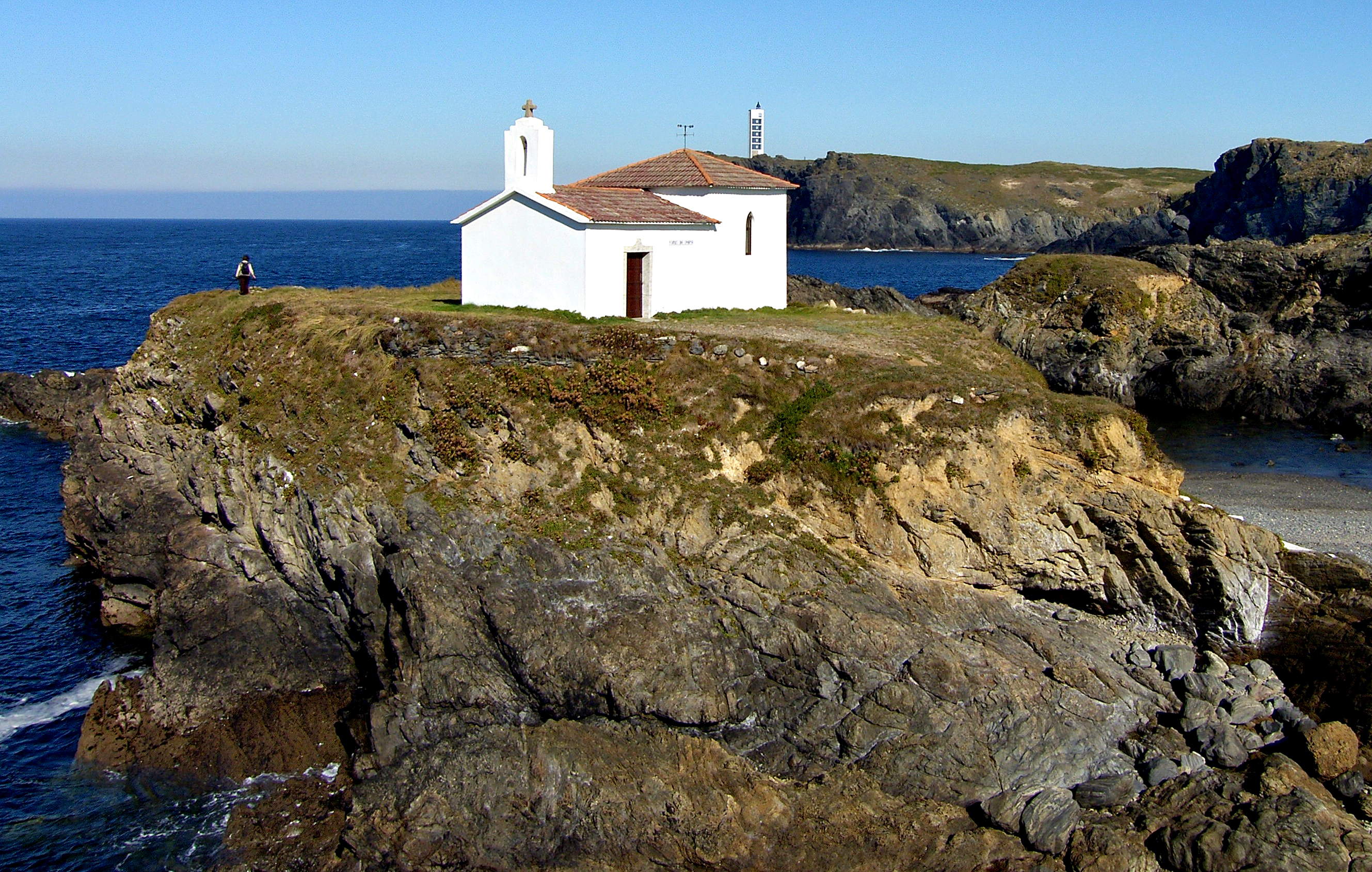 El santuario marinero de la Virxe do Porto La capilla de Nosa Señora do Mar, también conocida como Virxe do Porto, corona un minúsculo peñasco de las Rías Altas gallegas, en el norte del litoral coruñés. El atractivo de la ermita varía según el estado del tiempo y de la mar. Cuando éste es apacible y hay bajamar, la blanca figura se convierte en el destino de una corta excursión desde la playa de Meirás, en el municipio de Valdoviño. Sin embargo, cuando ruge el temporal del Atlántico y sube la marea, los surfistas acuden a disfrutar de las olas y la capilla queda aislada, desafiando sola la bravura del océano. Entonces, el mejor mirador sobre el conjunto es el faro de la Punta Frouxeira. Cada 14 de julio la ermita es el destino de una romería marinera.